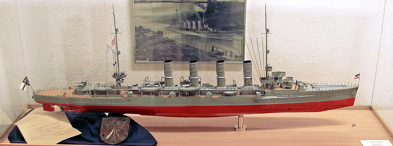 Description/Beschreibung: Modell der SMS Stralsund im Marinemuseum Dänholm Author/Fotograf: Darkone, 11. Mai 2006